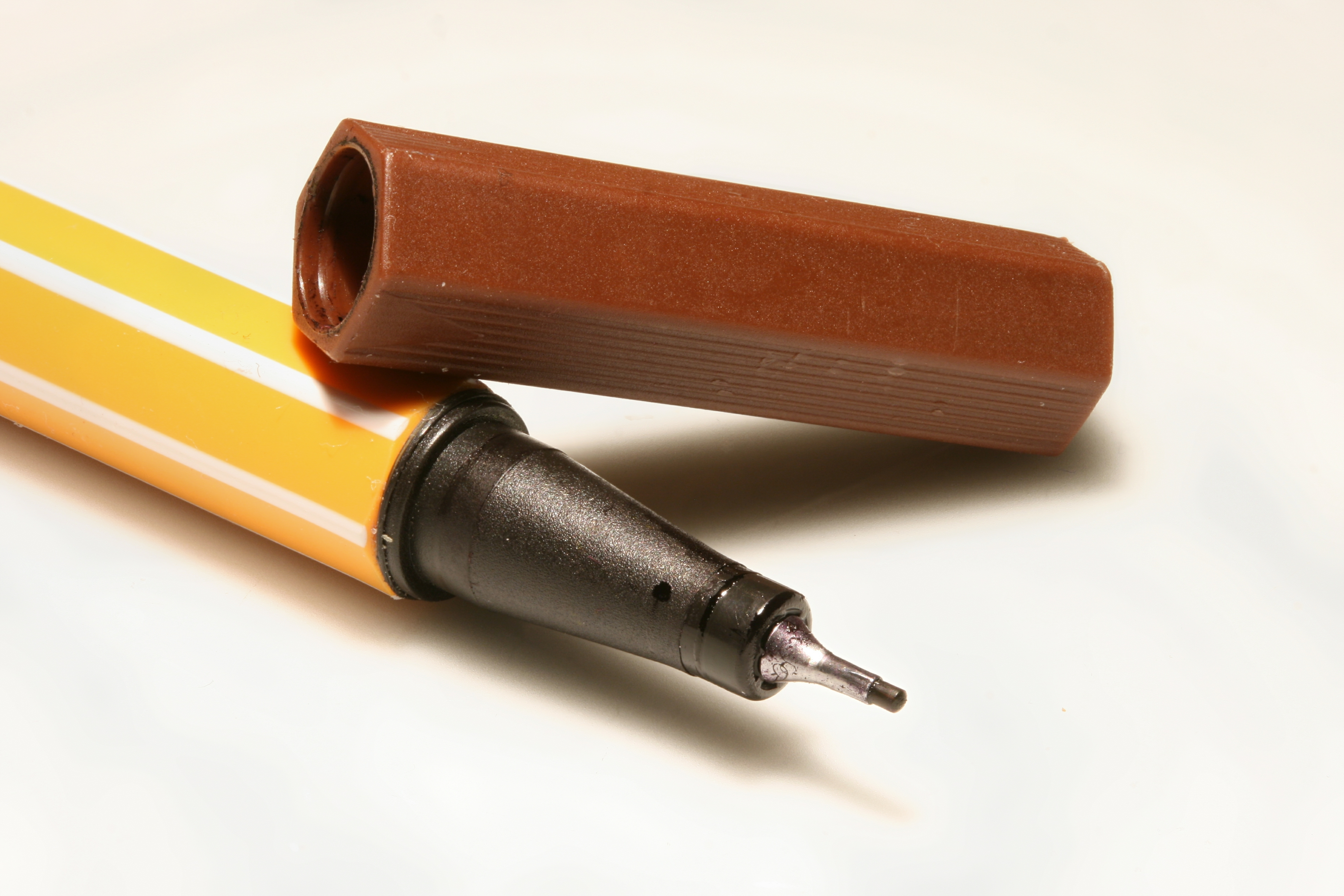 Stabilo Fineliner